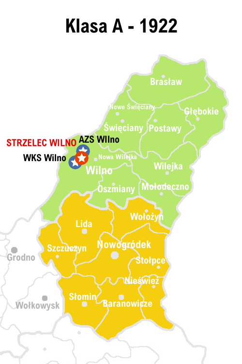 Rozgrywki w piłce nożnej w Wileńskim OZPN w 1922 roku